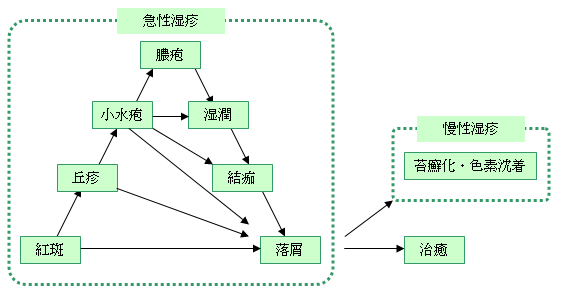 湿疹三角の図